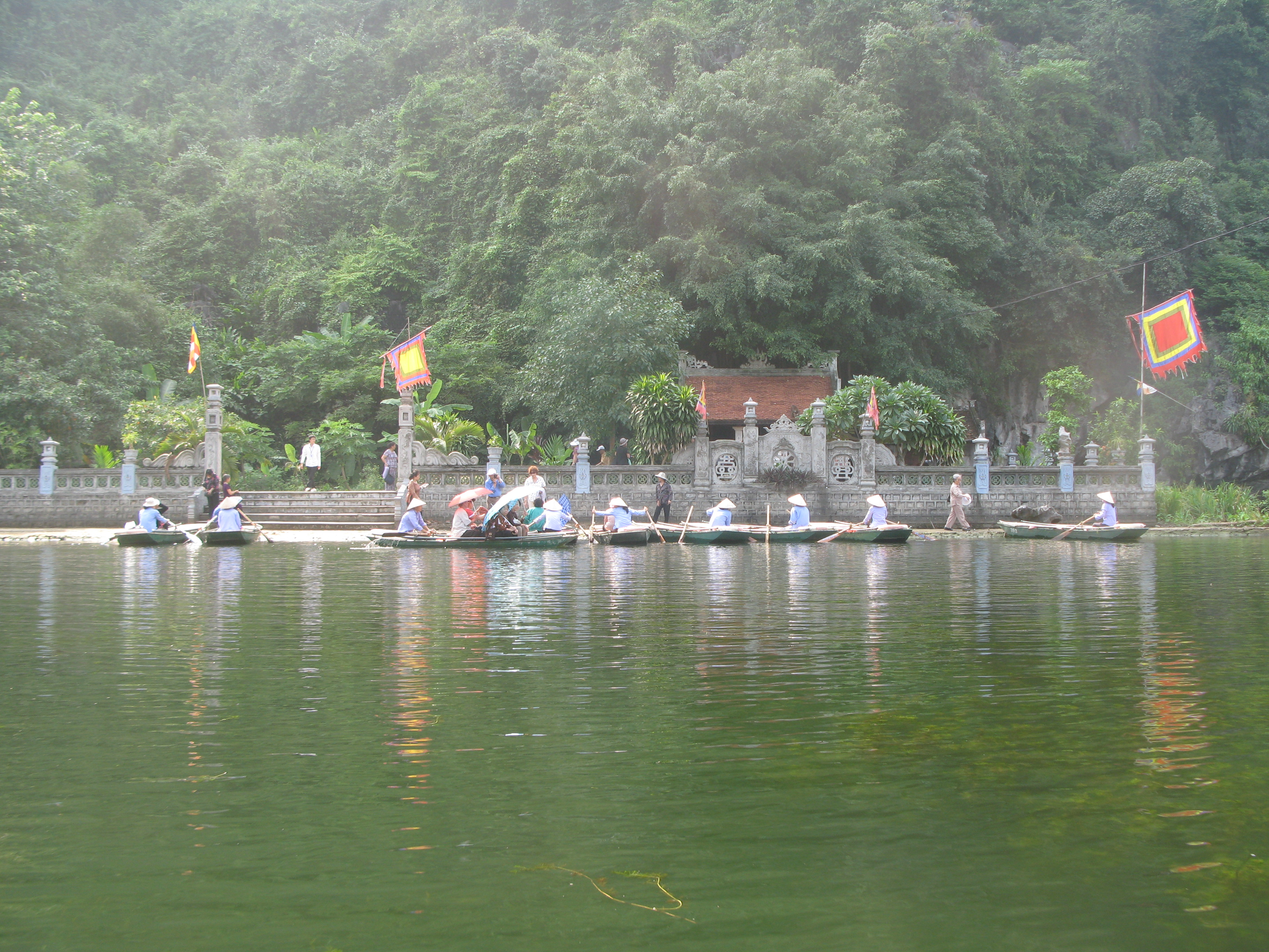 Toàn cảnh Đền Trình nơi thờ hai vị tướng nhà Đinh thuộc Khu du lịch Tràng An, Ninh Bình